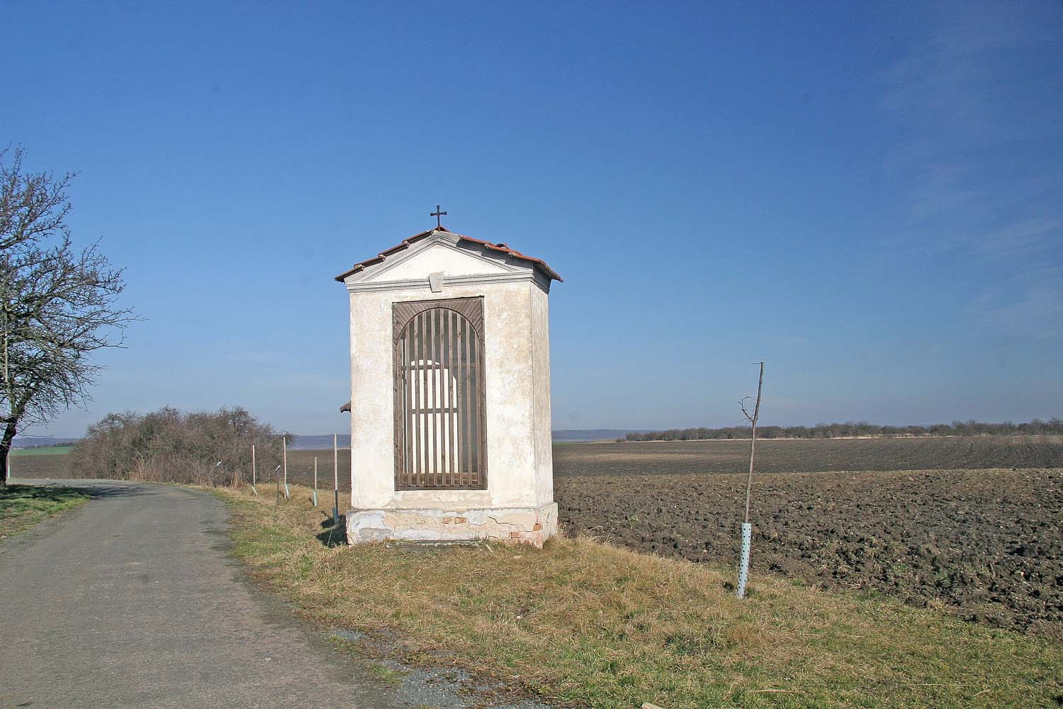 Hrubý Jeseník - výklenková kaple u cesty k rozhledně, district Nymburk autor:Prazak date:17. 2. 2007